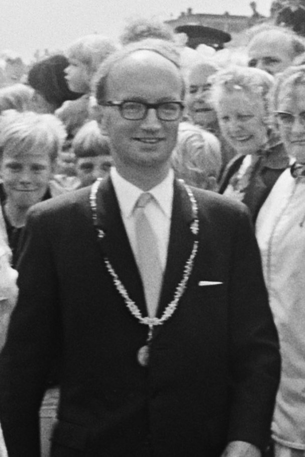 Koningin Juliana in de haven van Den Oever, naast haar burgemeester K.D. Dorsman van Wieringen